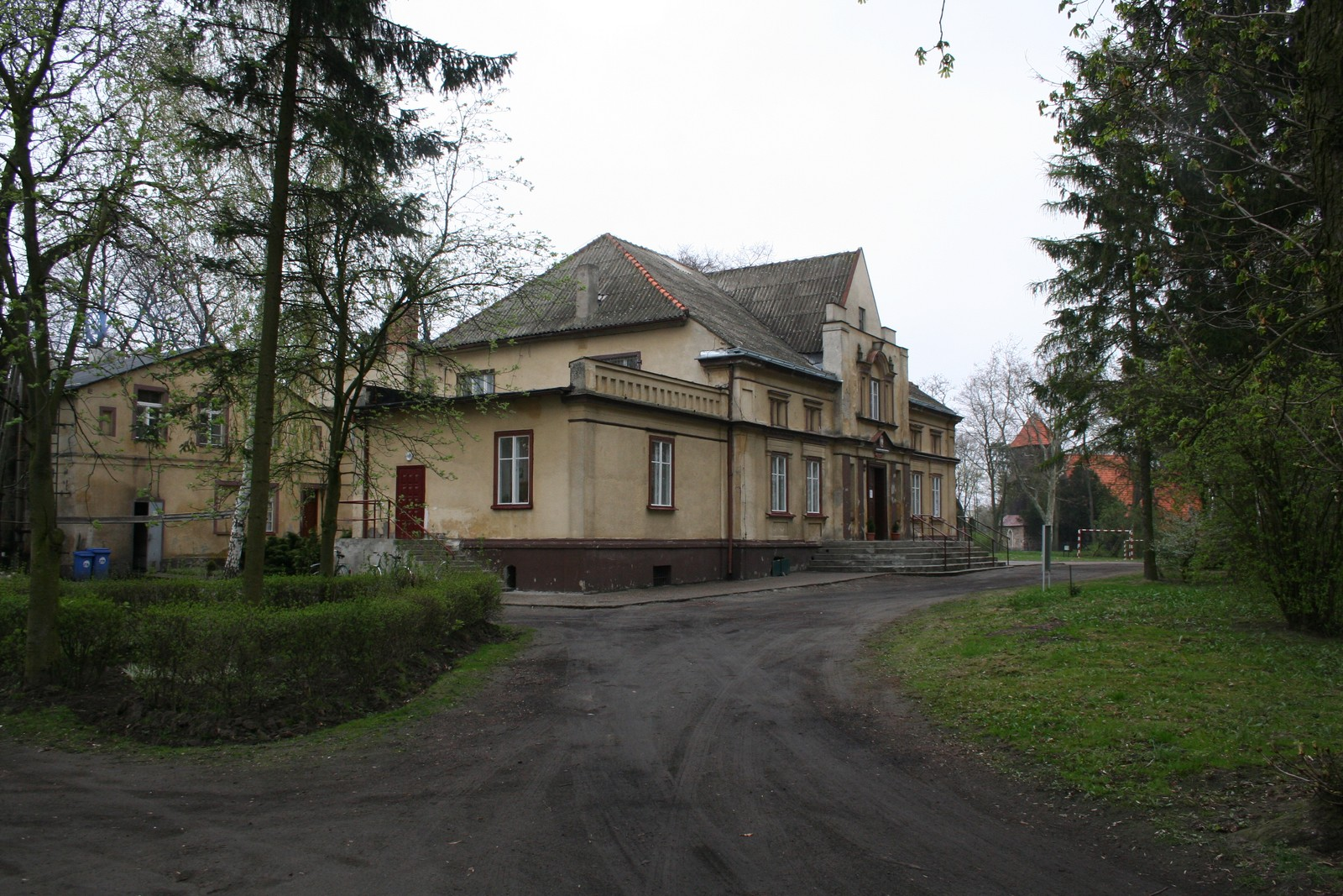 Trzebcz Szlachecki - zespół dworski, XIX-XX w.: dwór z oficyną, poł. XIX; spichrz, 1938; rządcówka, 4 ćw. XIX w.; kuźnia, 3 ćw. XIX w.; park (2 części), 1 poł. XIX w.